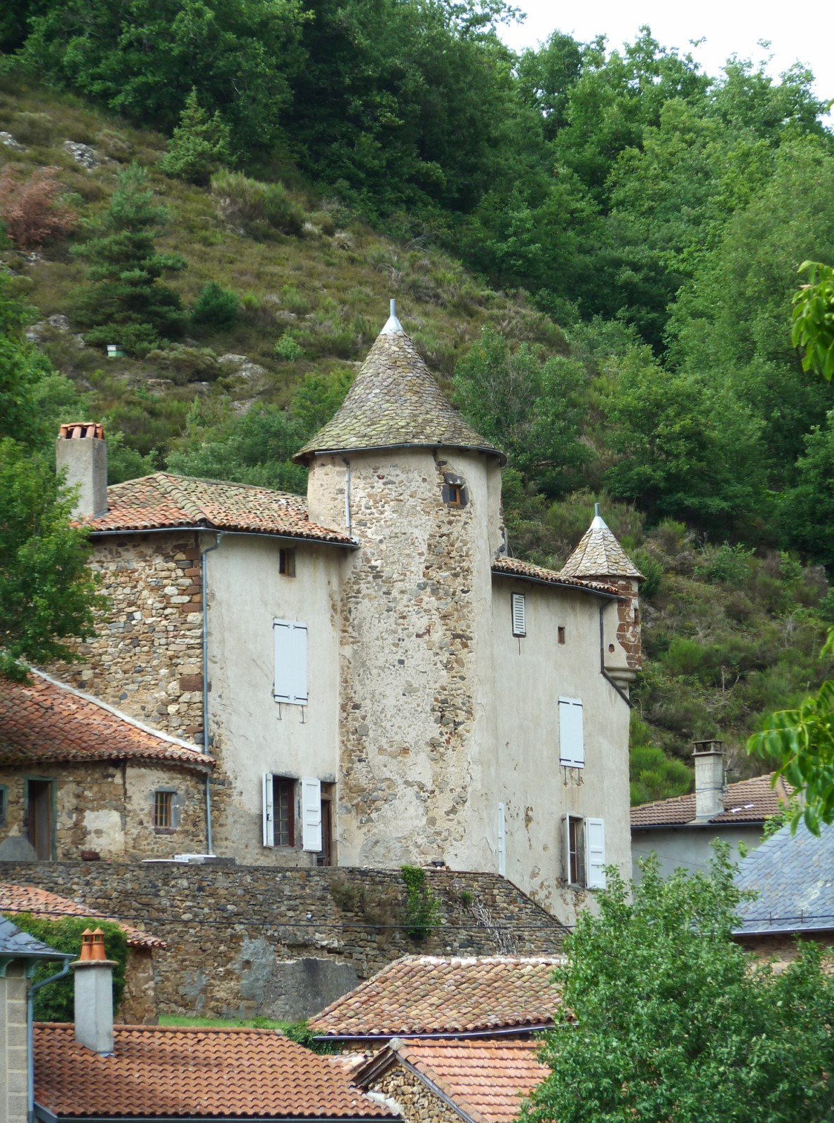 Château de Bonnac (Cantal, Auvergne, France)